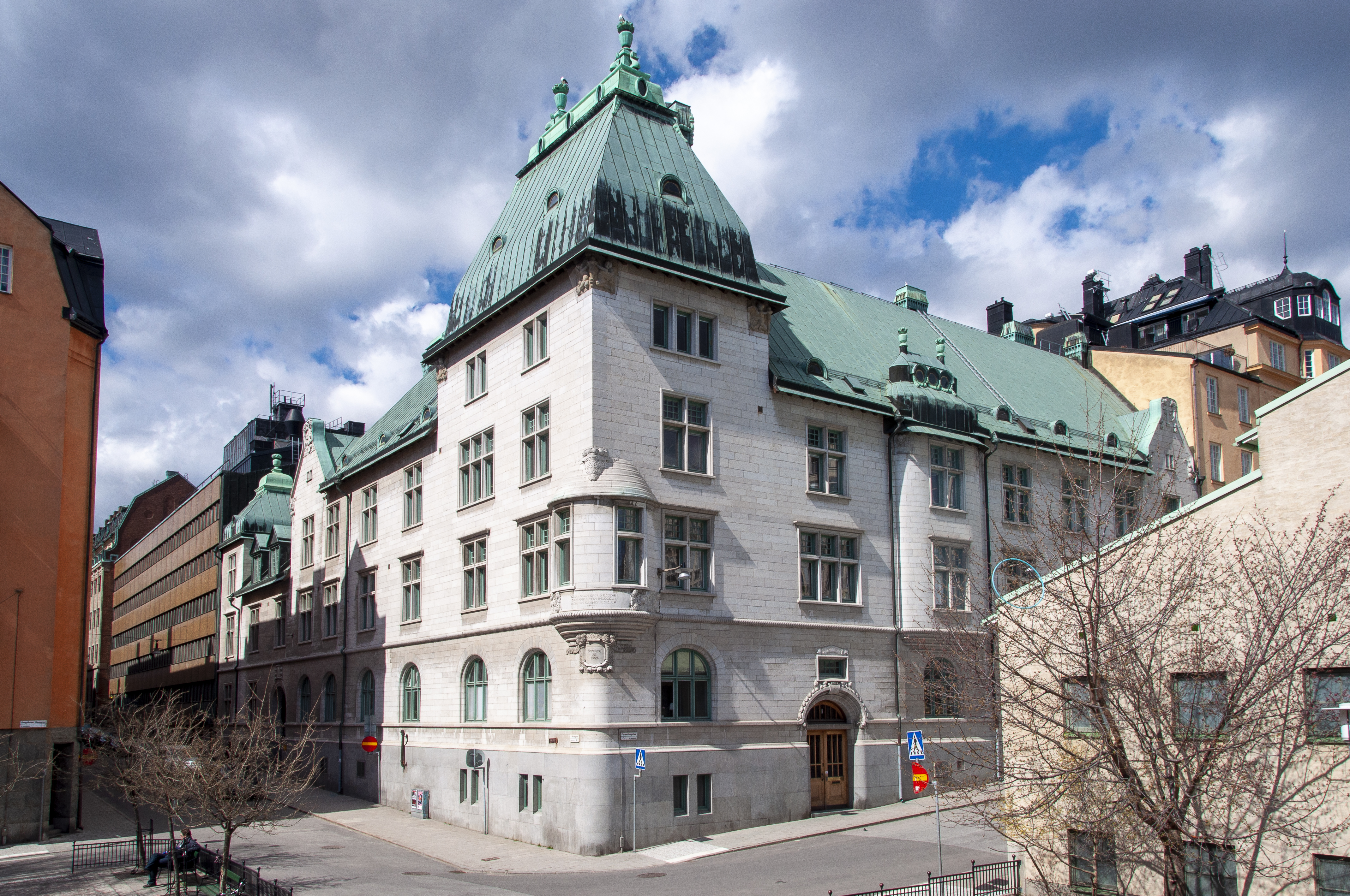 Kungsholms församlingshus, Garvargatan 2, Parmmatargatan 1, 3. kv Murmästaren 8. Byggnadsår 1900-02, arkitekt Erik Lallerstedt, byggherre Kungsholms Församlings Kyrkorad, byggmästare S Bergström -grunden, W Carlsson -övrigt